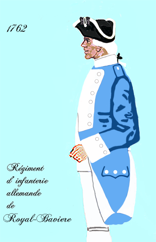 Uniform eines königlich französischen Infanterie-Regiments nach dem Choisel-Erlaß von 1762. - Entnommen und überarbeitet aus: „LES UNIFORMES ET LES DRAPEAUX DE L'ARMÉE DU ROI“ Marseille 1899.